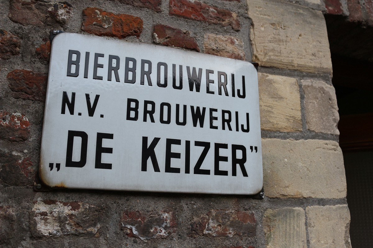 Naambord Stoombierbrouwerij De Keyzer